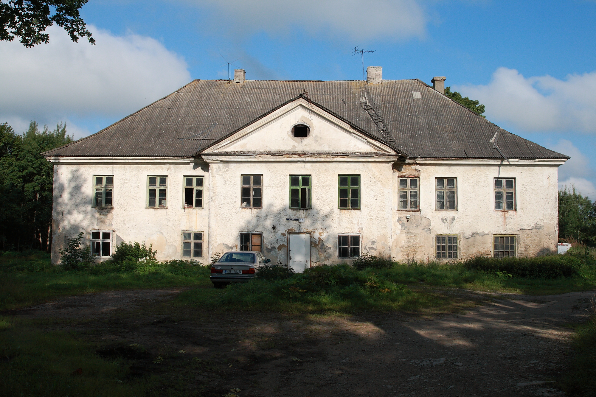 Keila pastoraadi peahoone